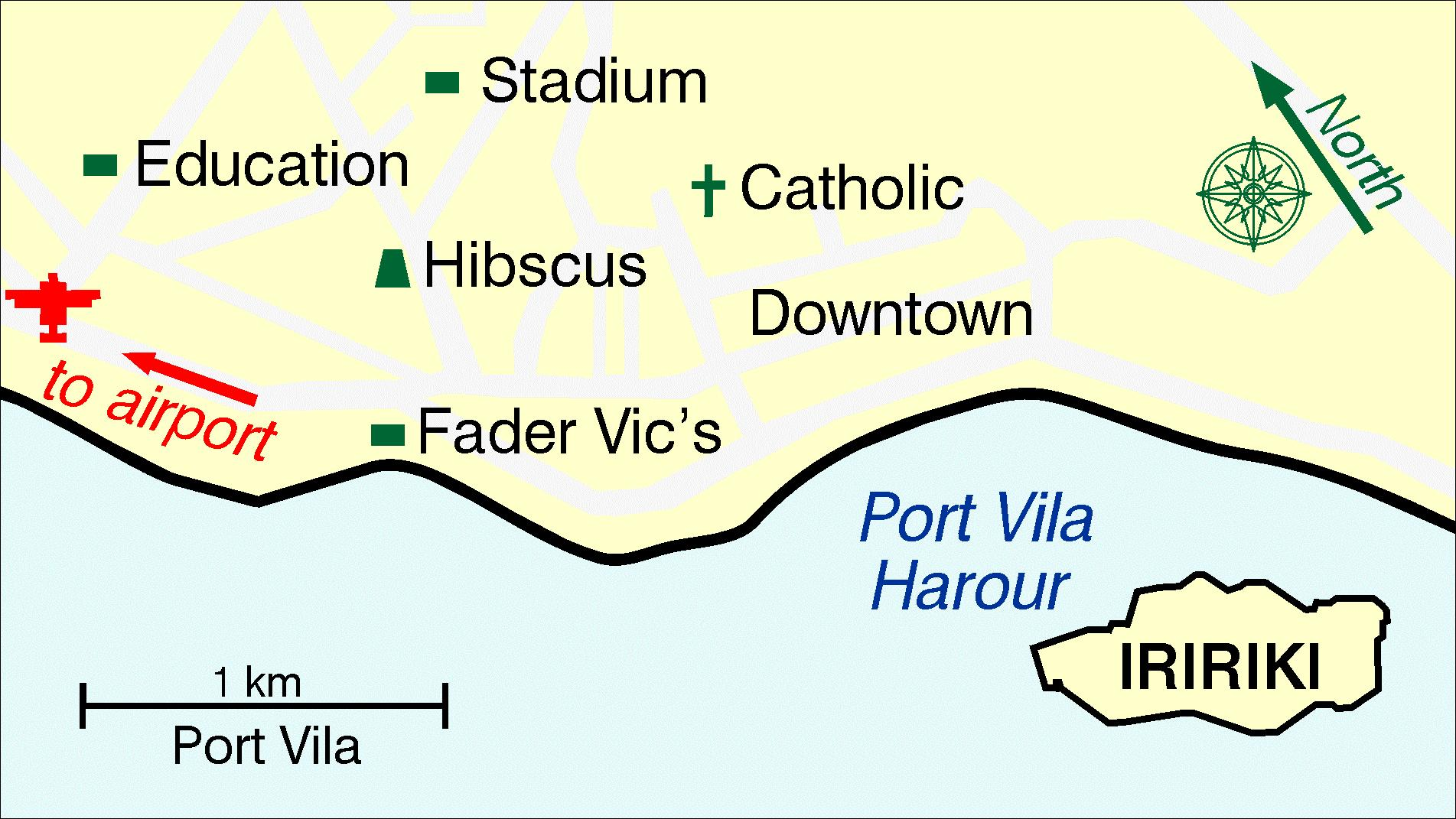 Карта на остров Иририки.